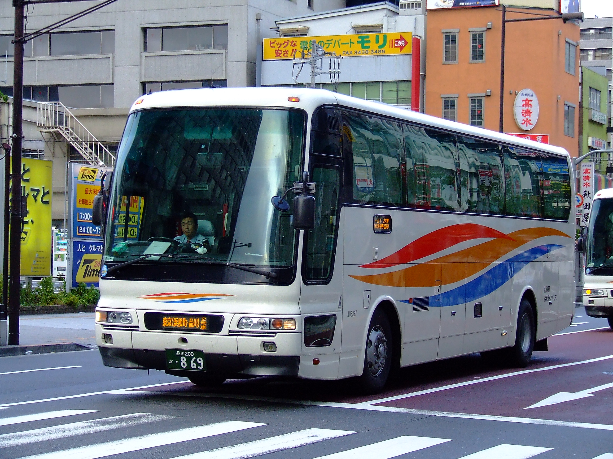 京浜急行（羽田京急バス）の高速バス「ビーム・1号」浜松町バスターミナル付近にて